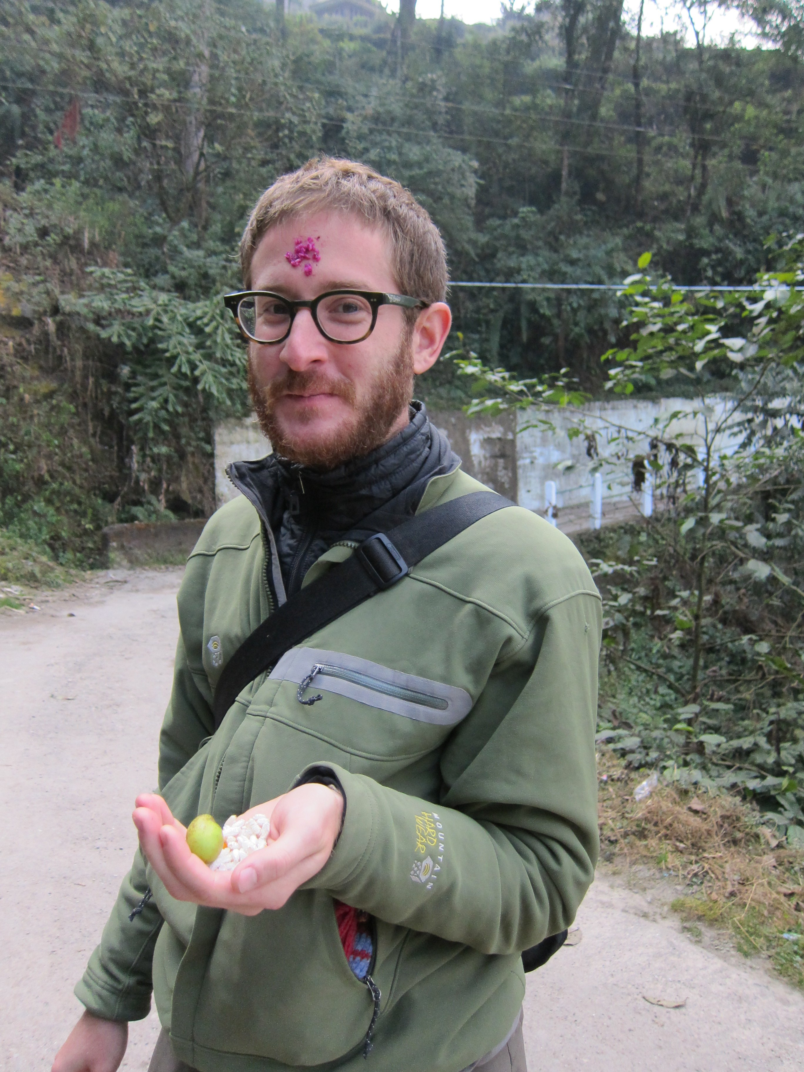 Darjeeling, West Bengal India